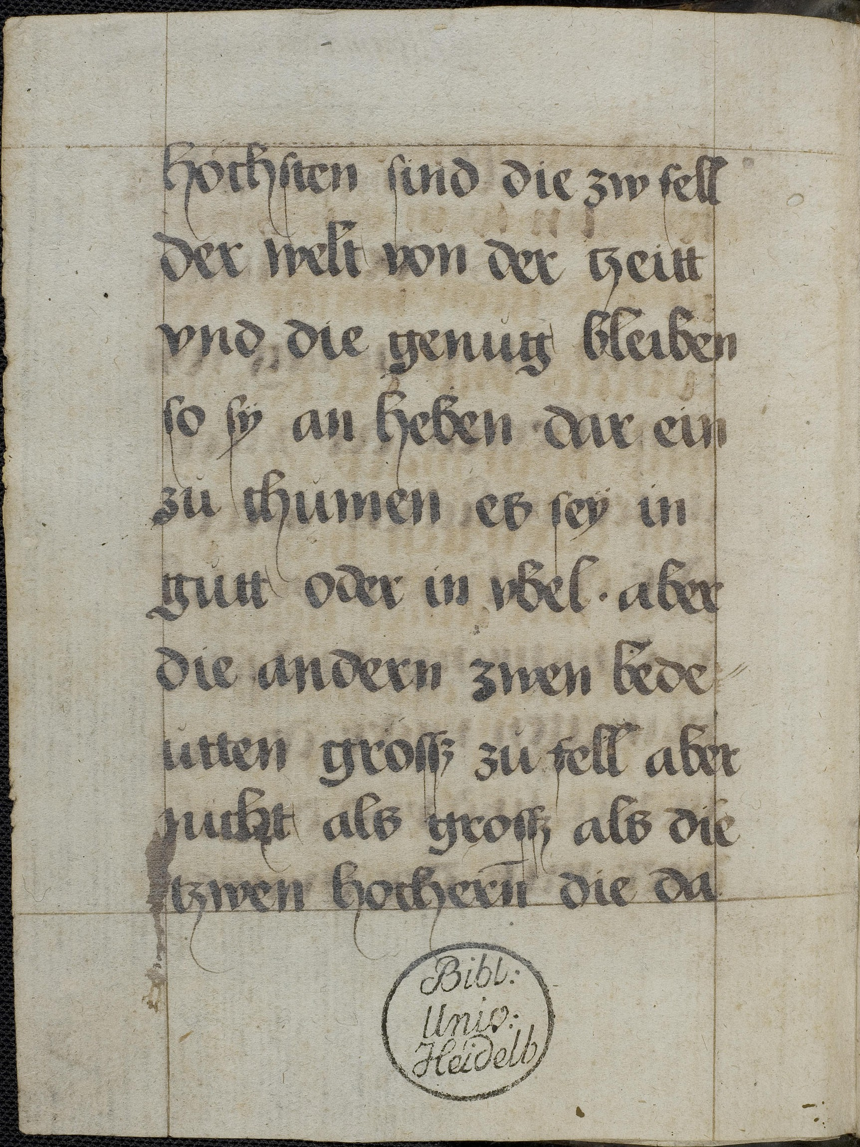 Codex Palatinus germanicus 13, Blatt 1v - Albumasar (Abū-Maʿšar Ǧaʿfar Ibn-Muḥammad): De significationibus planetarum (deutsch)